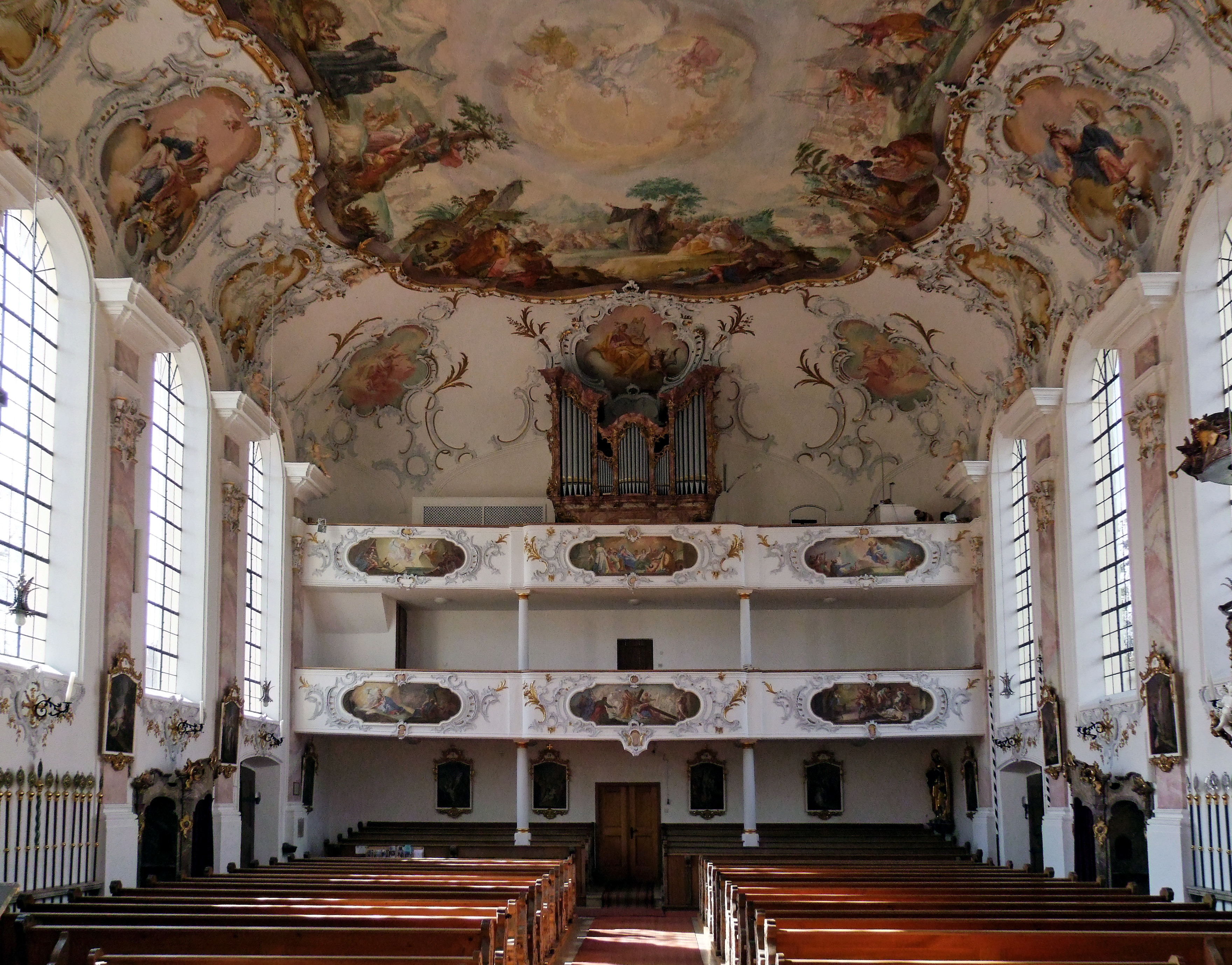 St. Magnus in Unterrammingen in Oberschwaben